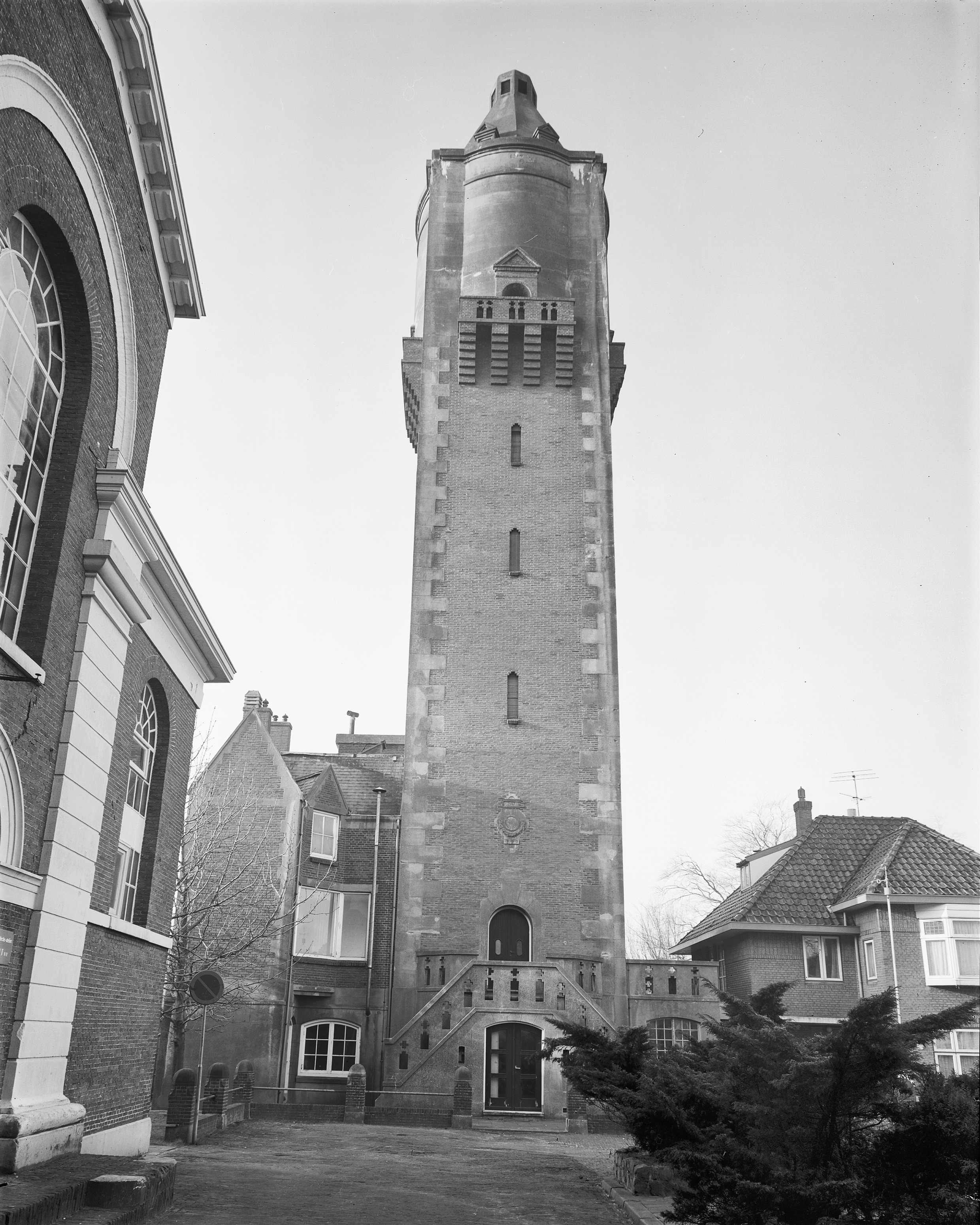 Watertoren: oostzijde toren